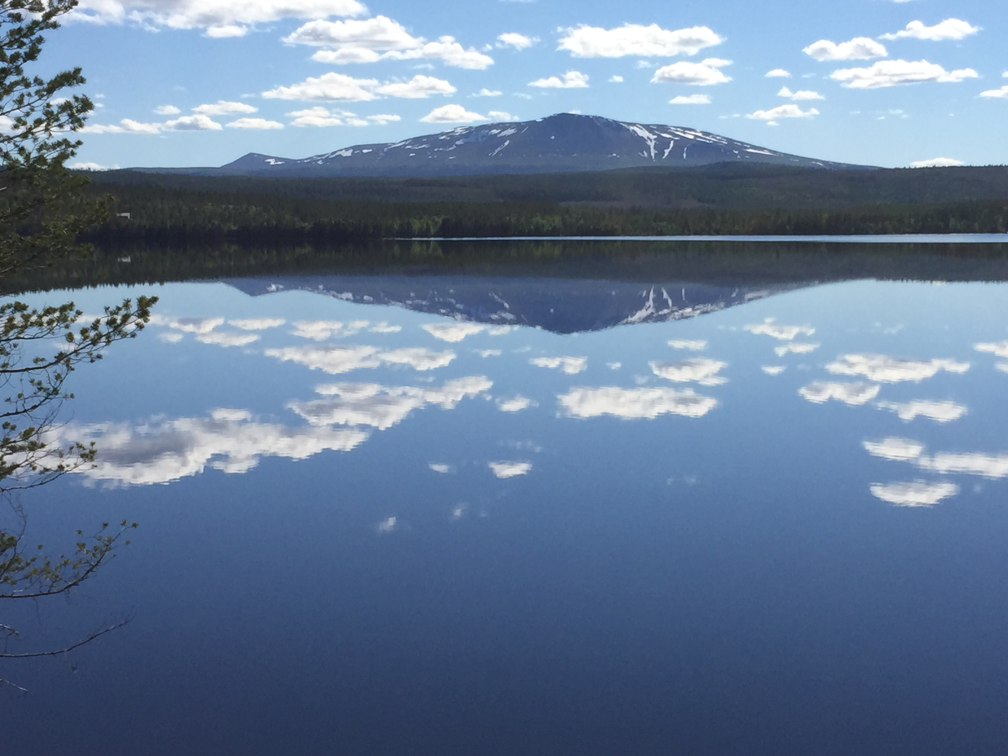 Sonfjället med Vikarsjön Foto